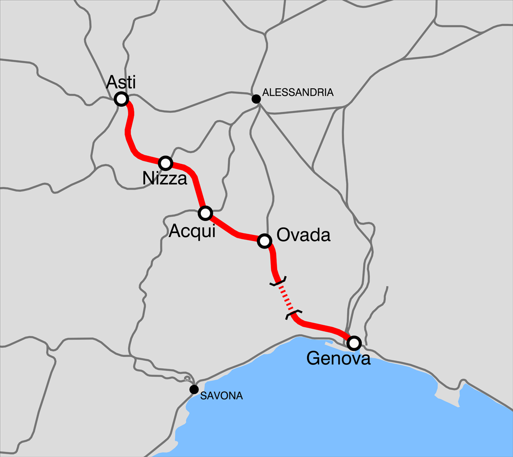 Mappa della ferrovia Asti-Genova